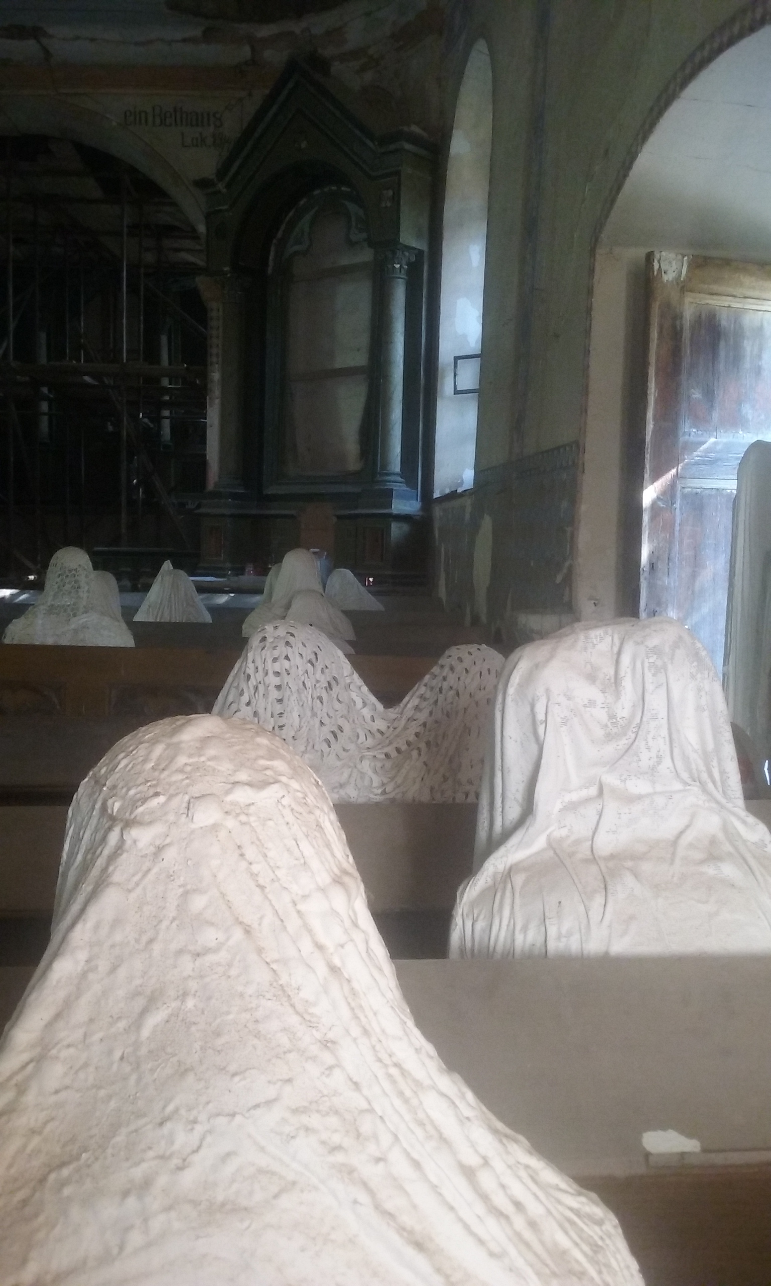 Kostel svatého Jiří v Lukové. Okres Plzeň-sever, Česká republika.